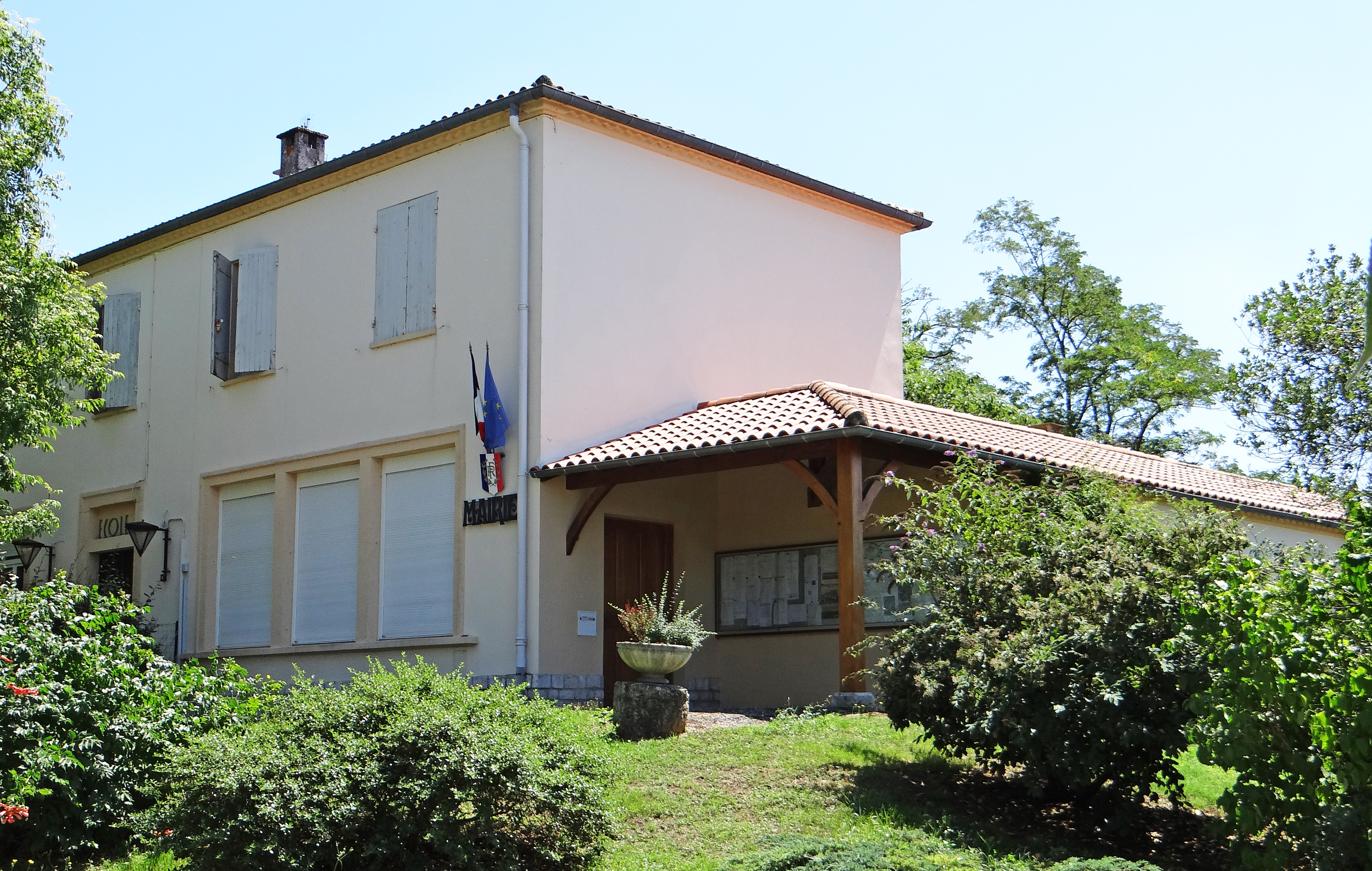 Saint-Martin-de-Beauville - Mairie